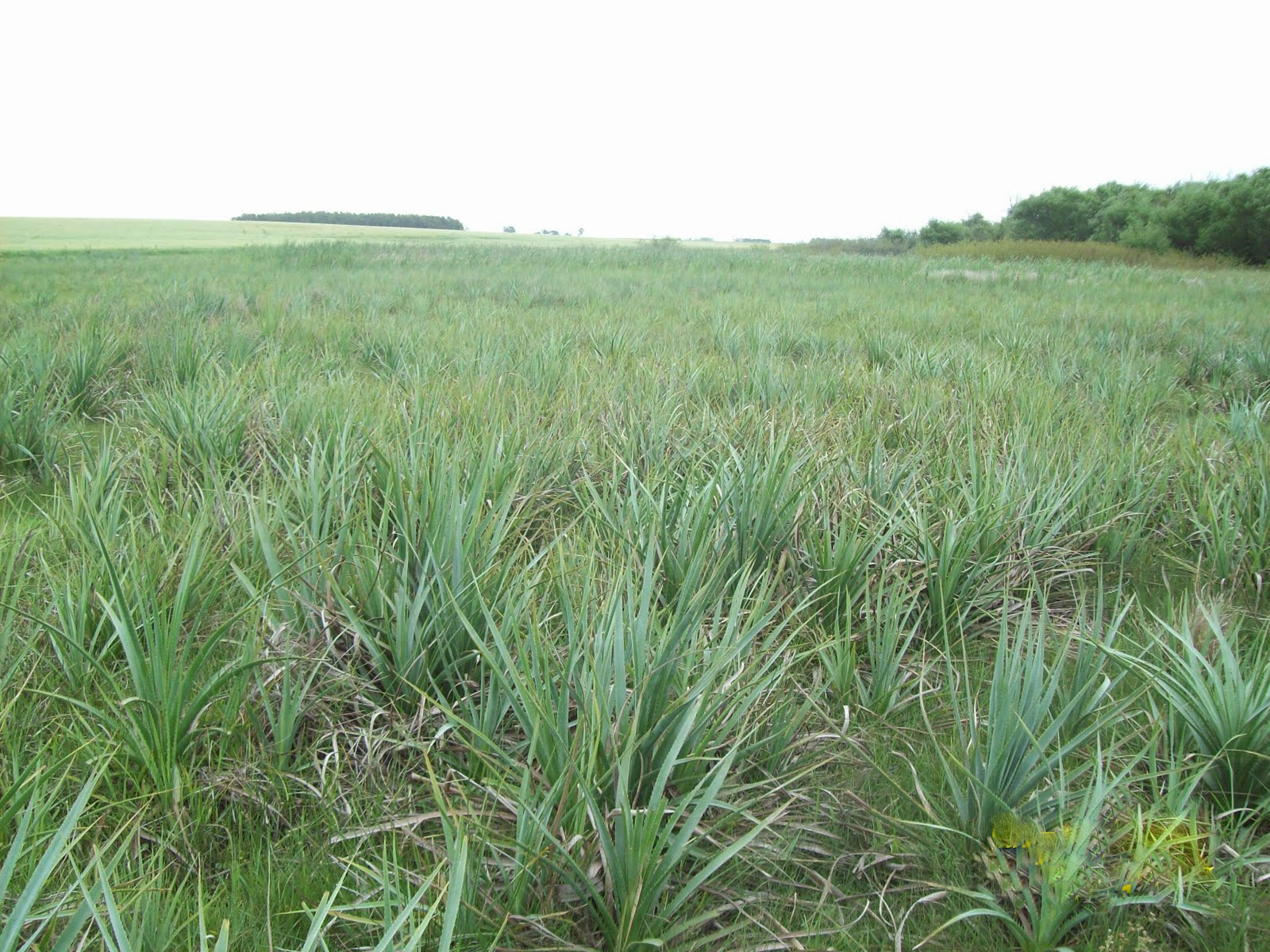 Eryngium pandanifolium. Apiaceae. Fotos tomadas en pajonal al margen del Arroyo Rolón en Estancia "El Repecho" a 16 km de Villa del Carmen, departamento de Durazno y al margen de la Rambla Costanera en Carrasco, departamento de Canelones, Uruguay.